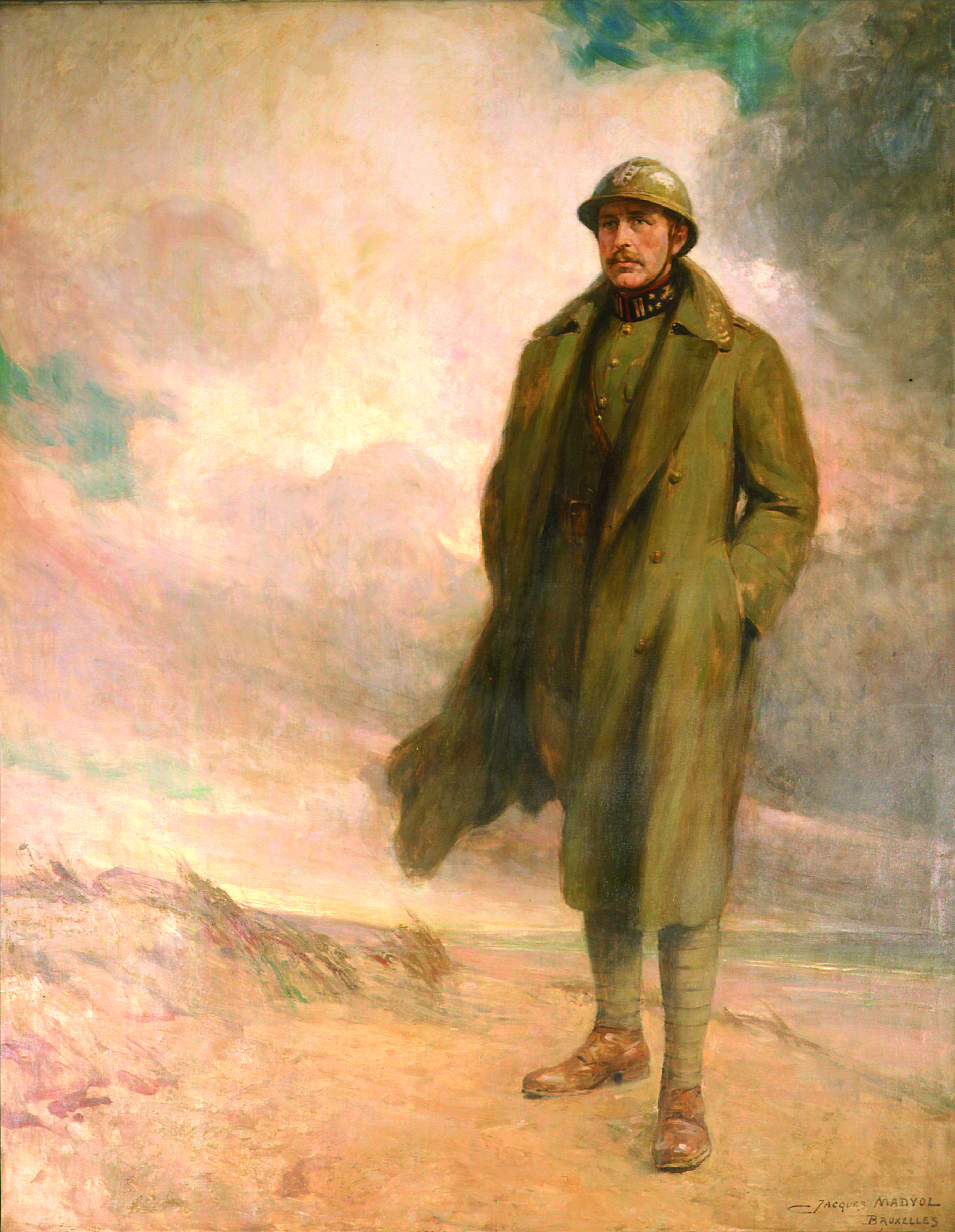 Título: Retrato do rei Alberto da Bélgica Autor: Jacques Madyol Ano: 1920 Técnica: Óleo sobre tela Dimensão: 253 cm x 200cm